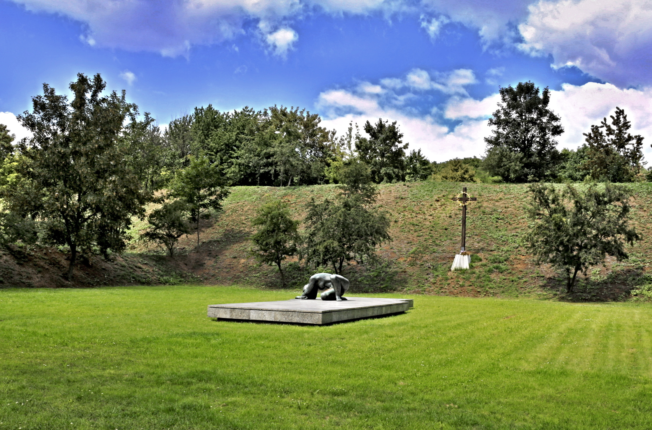 Kobylisy památník zastřeleným osobám